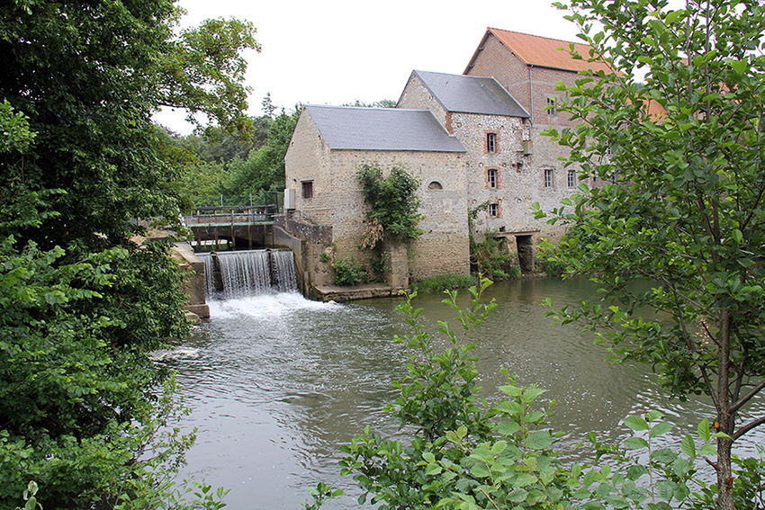 Hesdigneul moulin Lhomme